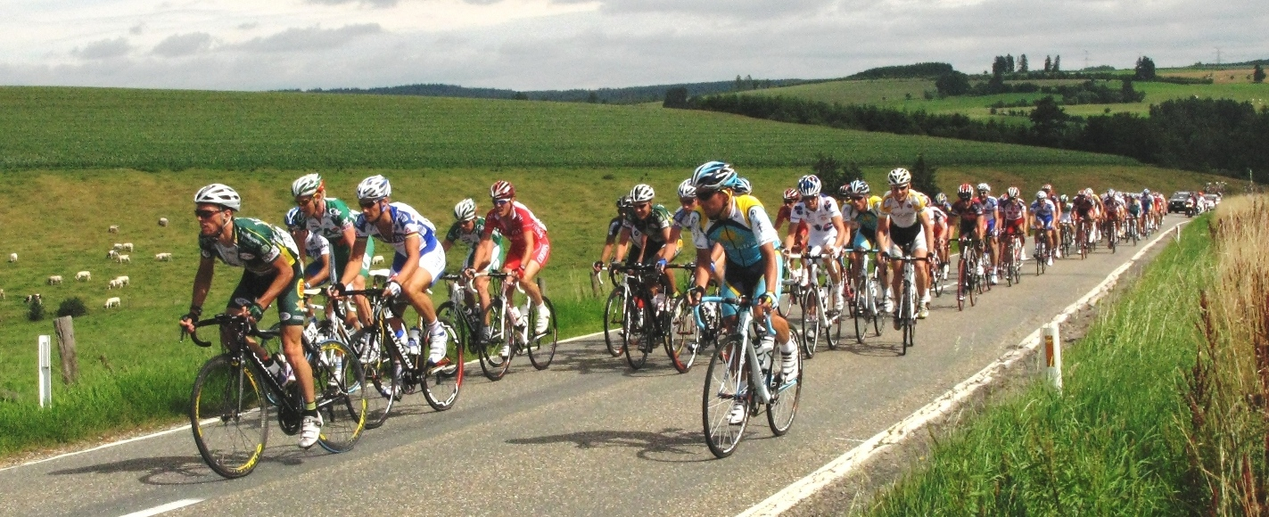 De Plotto op der 4. Etapp Gouvy-Seraing am Stouss vu Sommerain op Houffalize, op der Nationale N827, 5 km nom Depart. Kategorie:Vëlossport an der Belsch